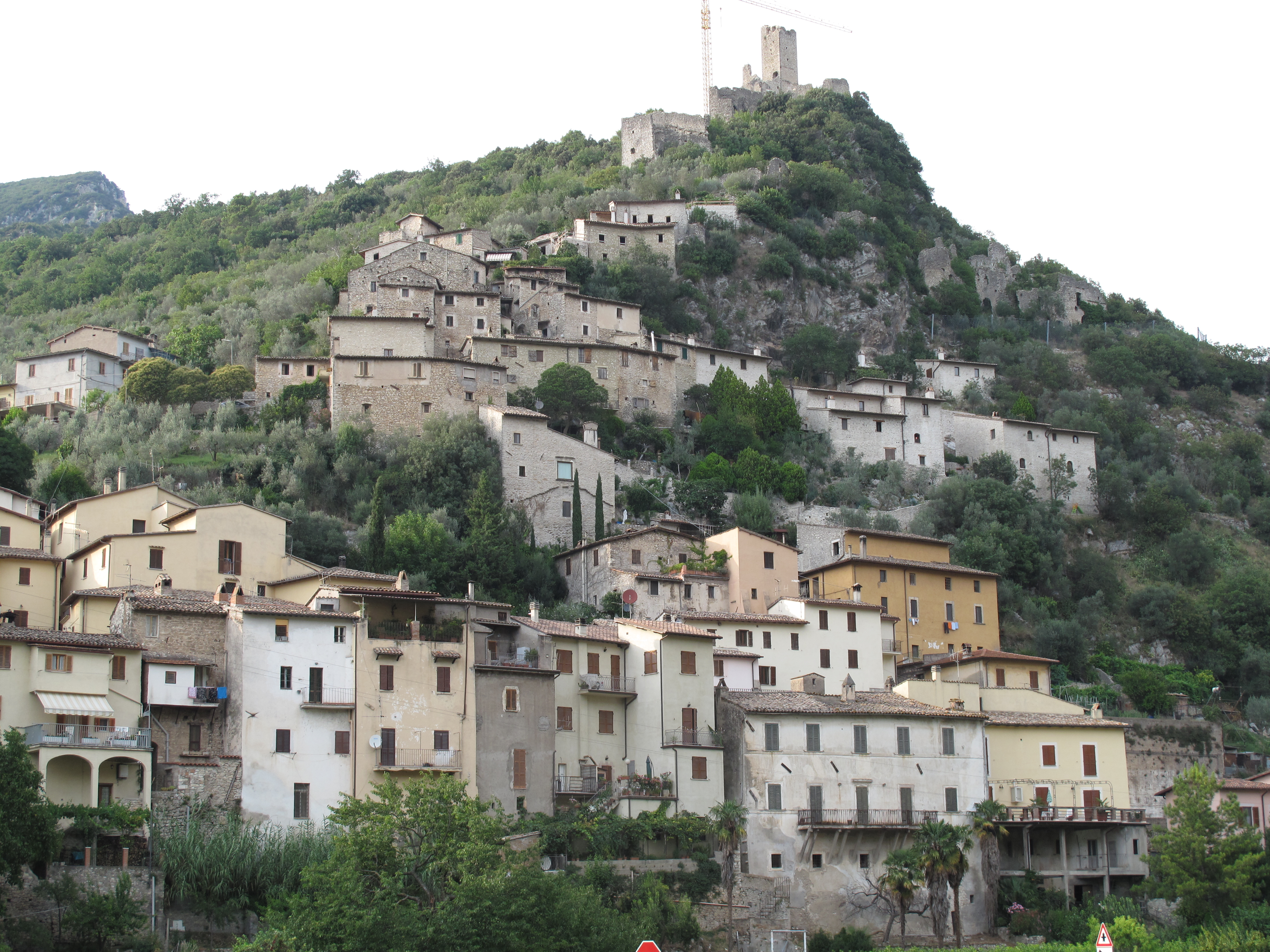 Ferentillo centro storico matterella